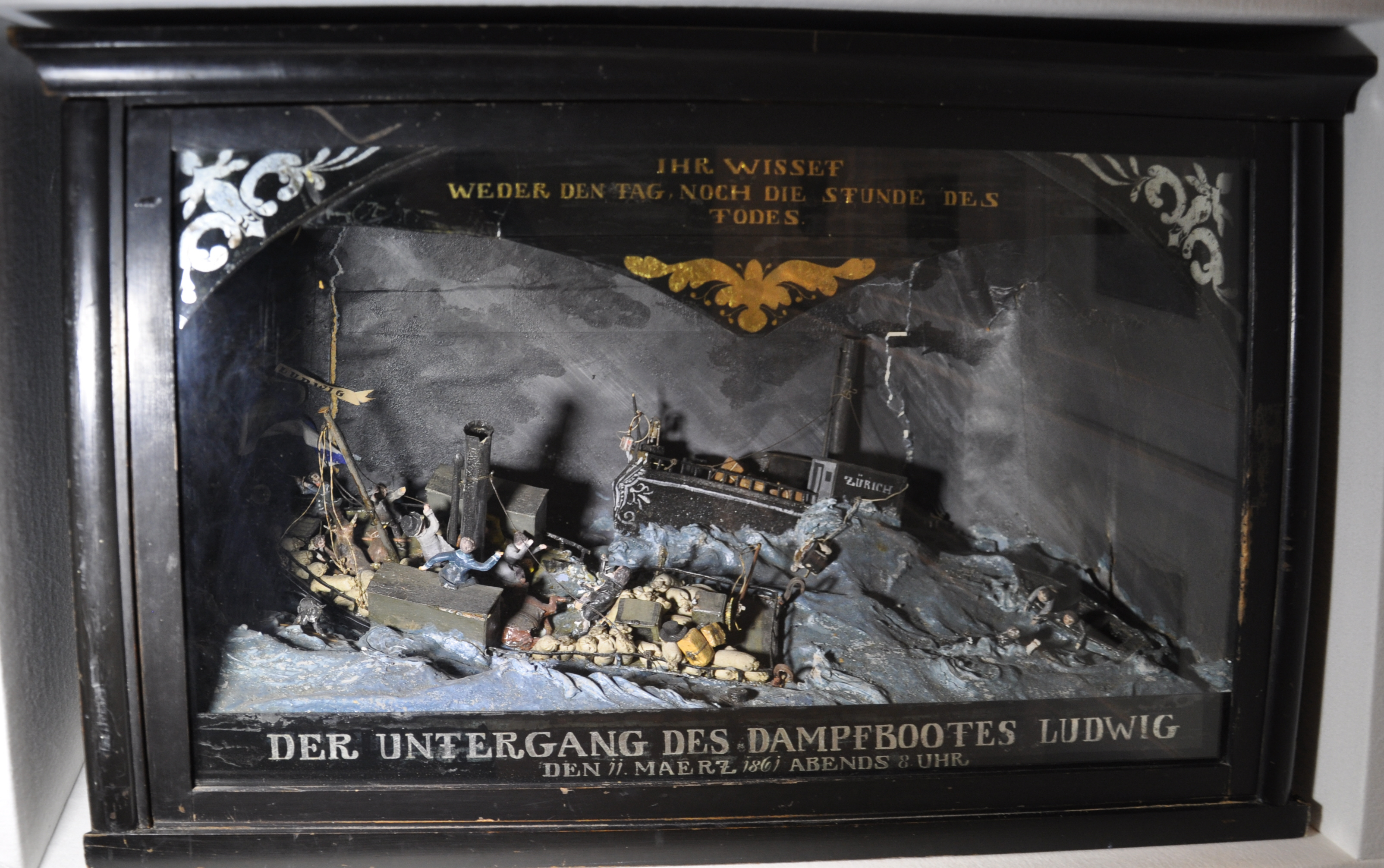 Untergang des Dampfboots Ludwig 1861, Diorama aus Papier, Textil, Keramik und Glas; Bregenz 1861 Bregenz, Vorarlberg Museum Vorarlberg museum Native namevorarlberg museumLocationBregenz, Vorarlberg, AustriaCoordinates47° 30′ 15.84″ N, 9° 44′ 48.01″ E Established1857Web pageVorarlberg Museum websiteAuthority control : Q2533480 VIAF: 124091336 ISNI: 0000 0001 2242 622X LCCN: n50051186 GND: 18871-2 SUDOC: 030717523 WorldCat institution QS:P195,Q2533480